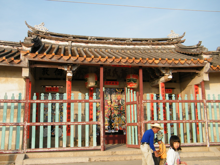 茂洲的另一座萧氏祖祠